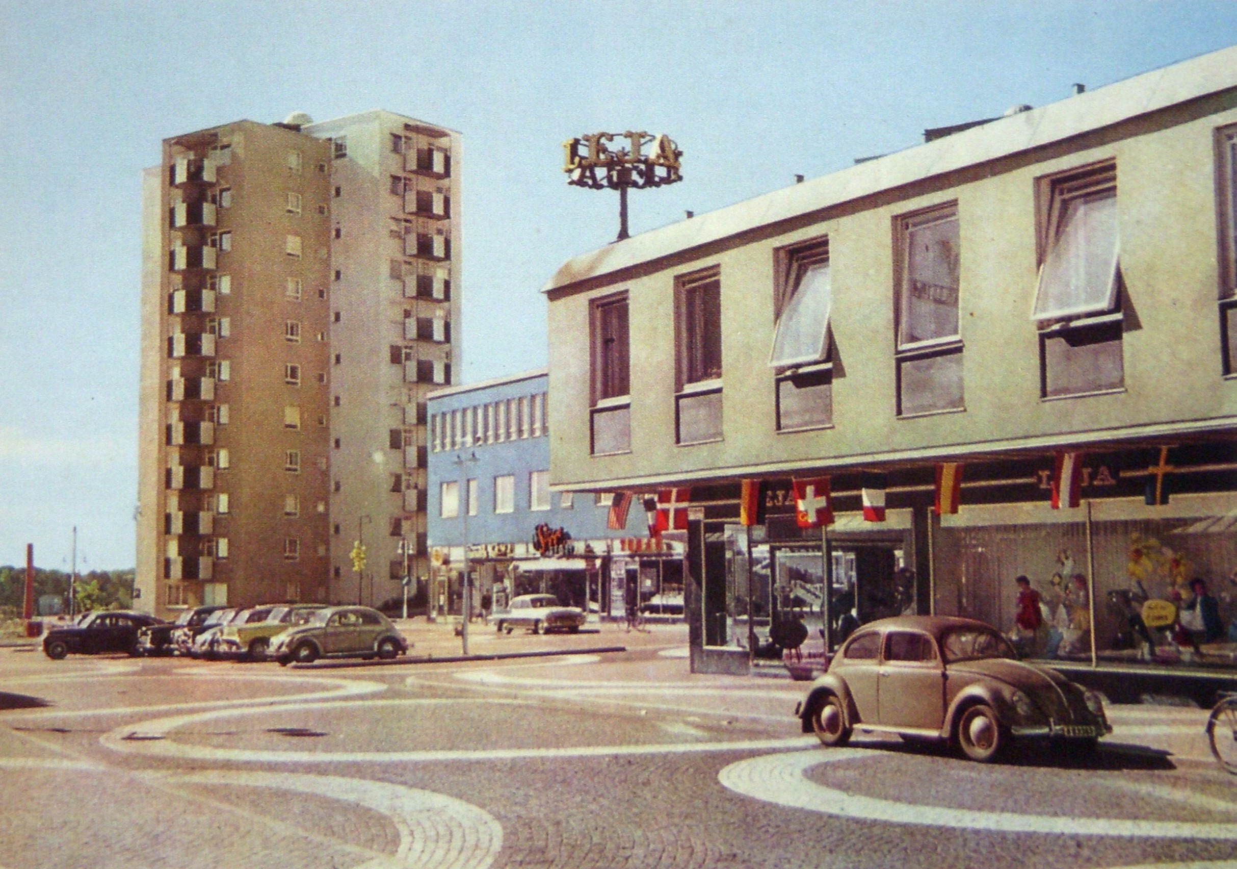 Höghus i Vällingby och del av Vänningby centrum